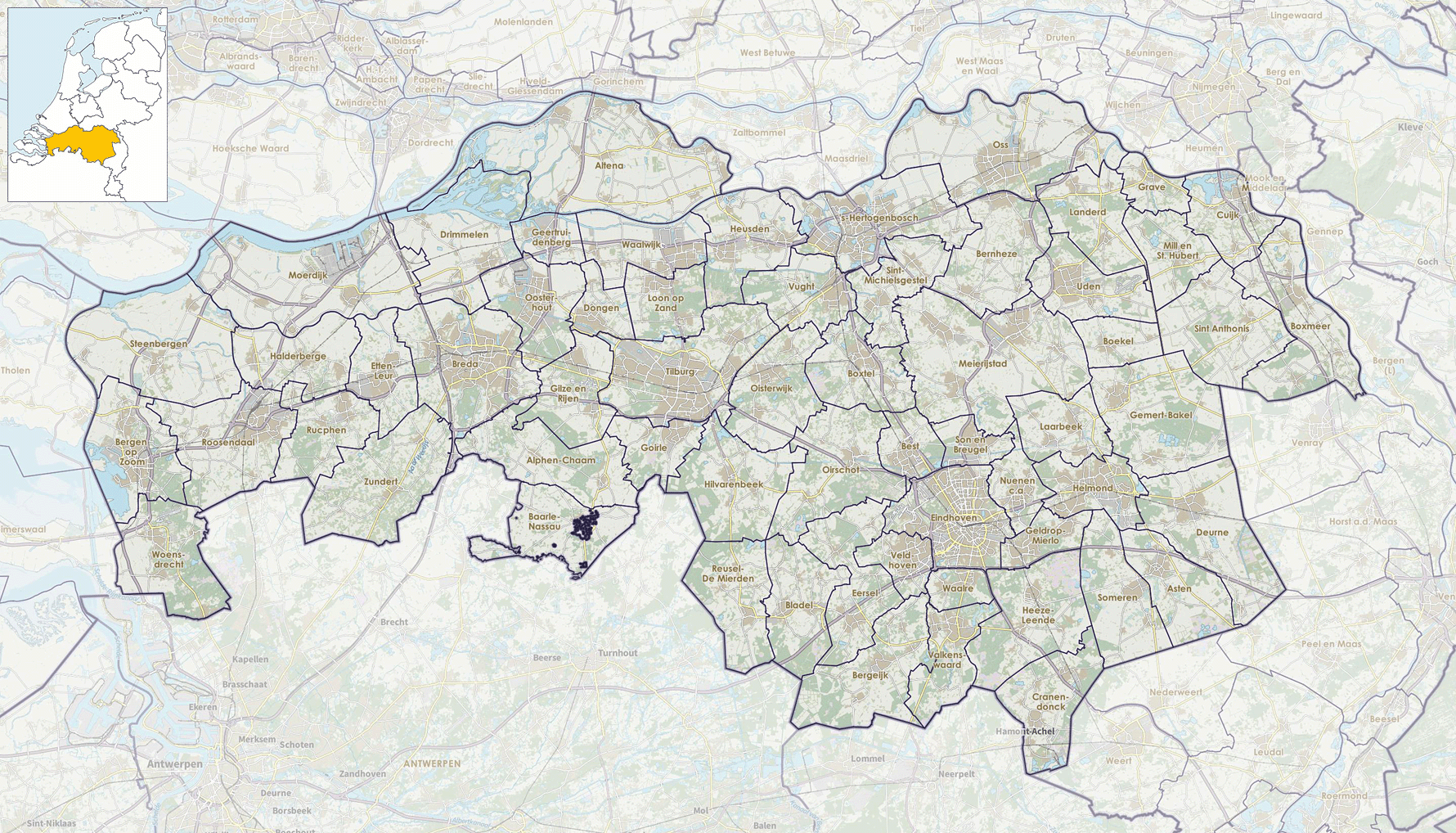 Positiekaartje van de provincie, variant "gemeentelabels"